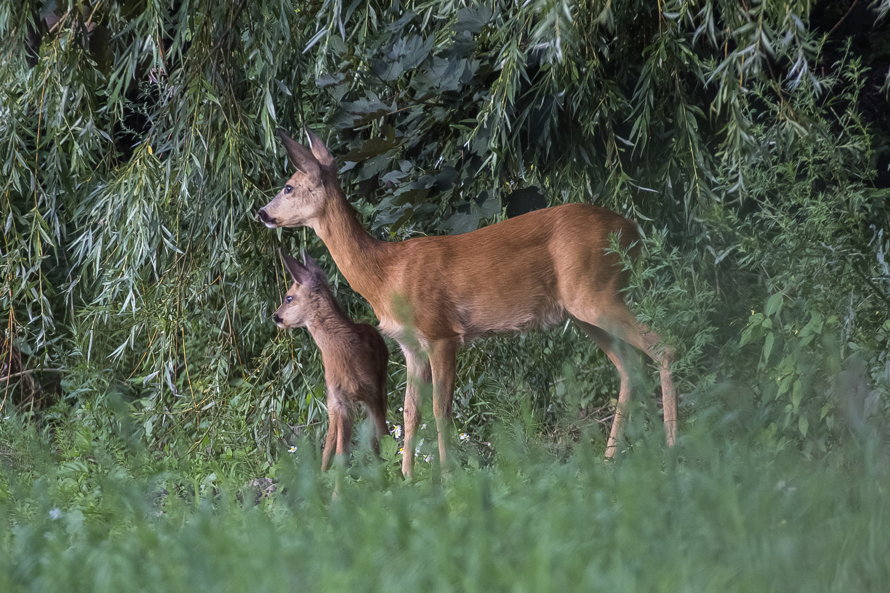 Lodz, Poland